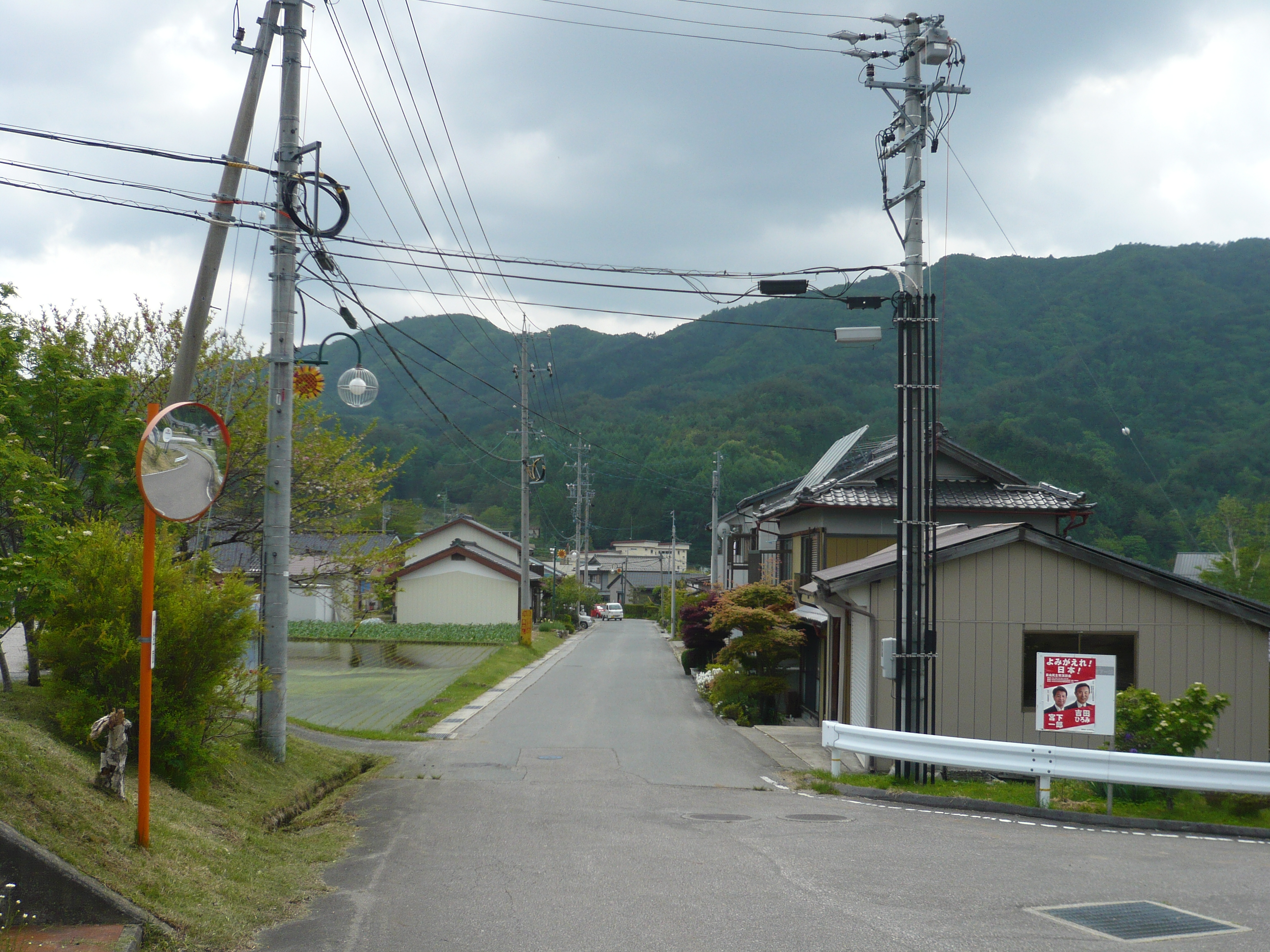 平谷村内風景